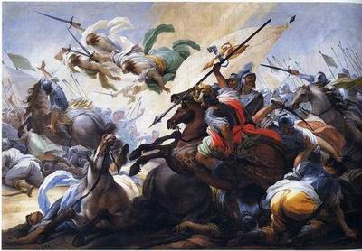 Storie di san Pio